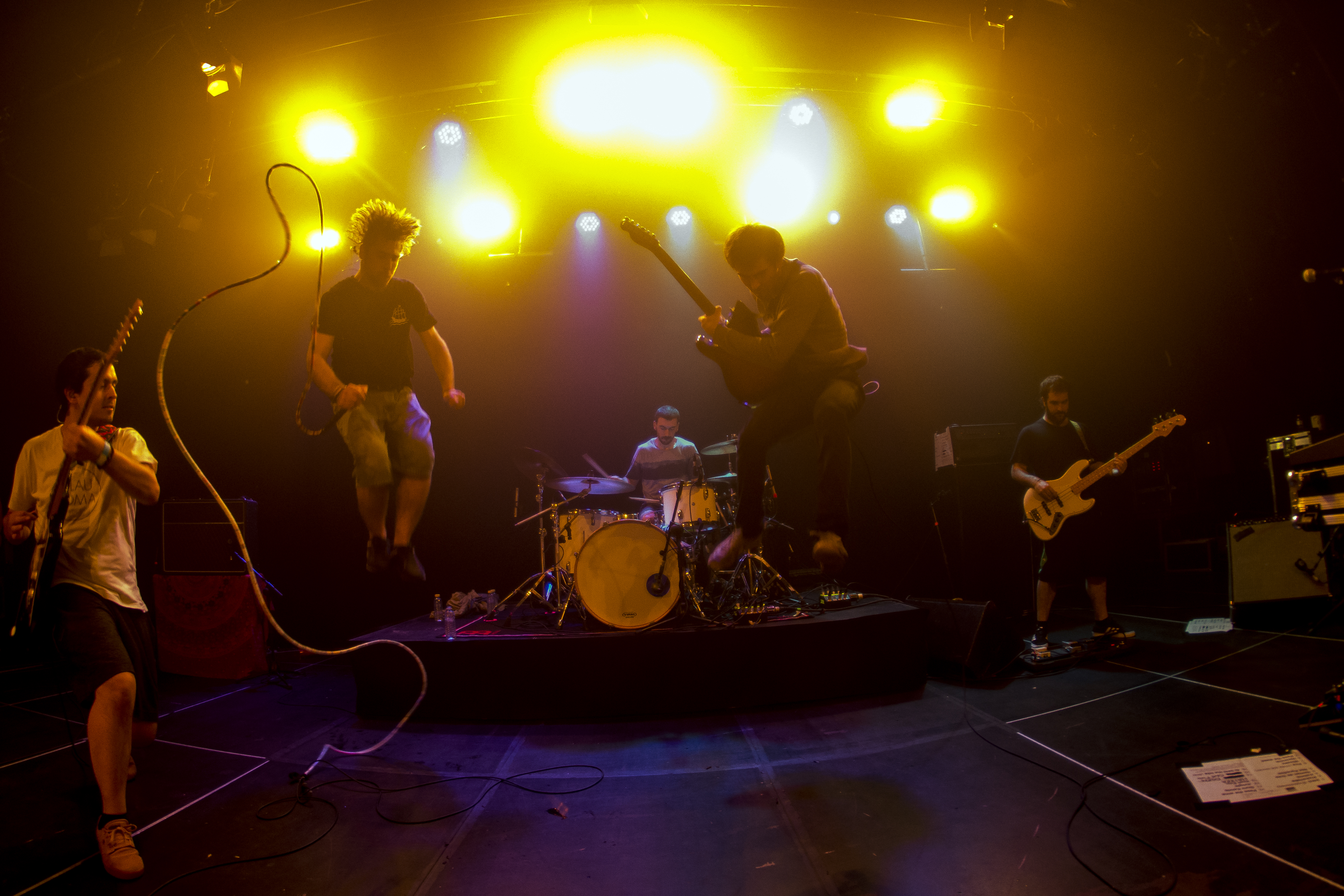 Dkluba kontzertua Intxaurrondo K.E.an. Argazkiak/fotos: Josetxo Pérez 2017/11/04